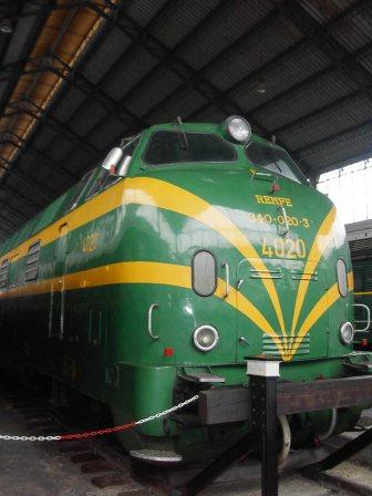 Locomotora diesel 340 preservada en el Museo Nacional Ferroviario